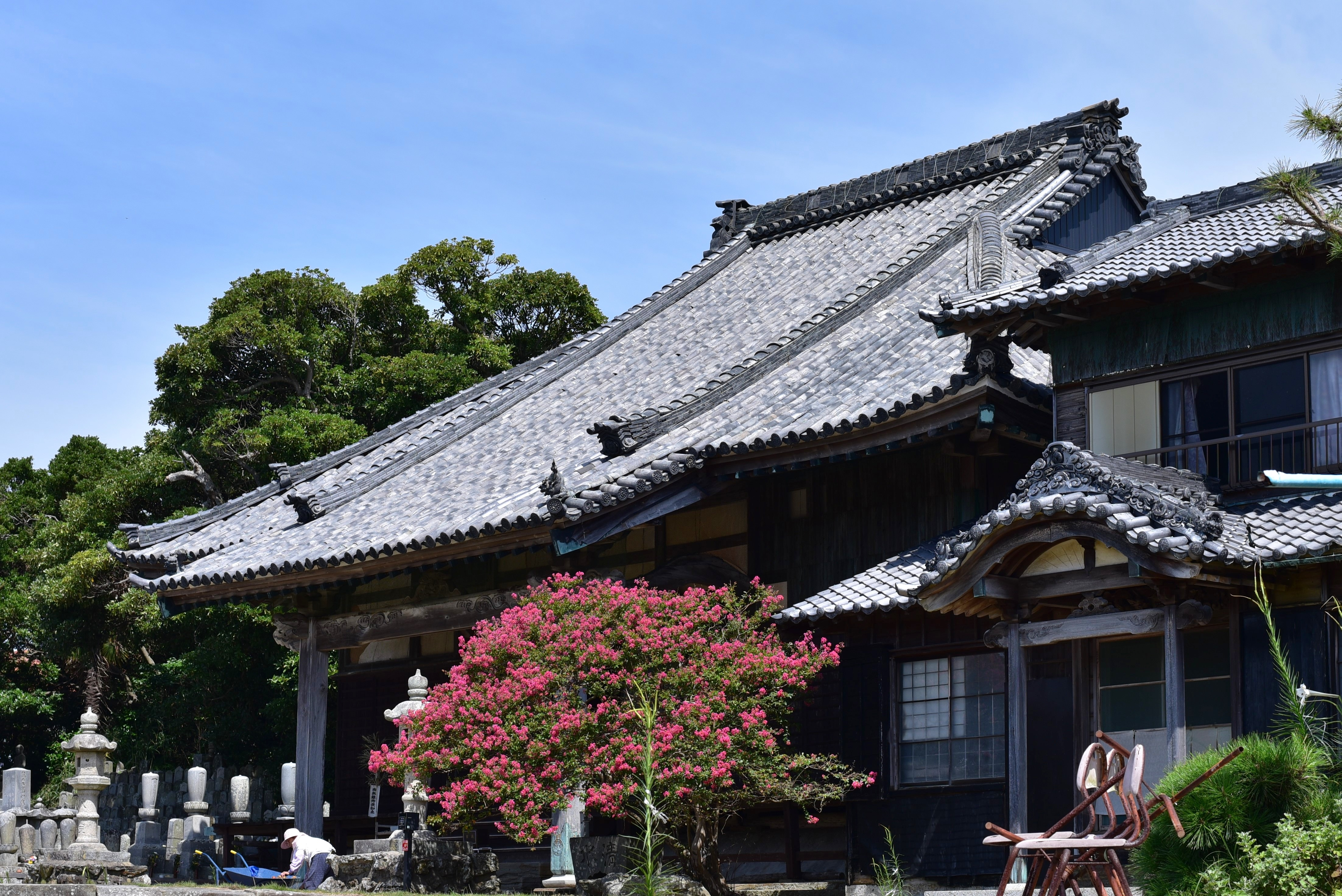 徳川家康が滞在した崇運寺